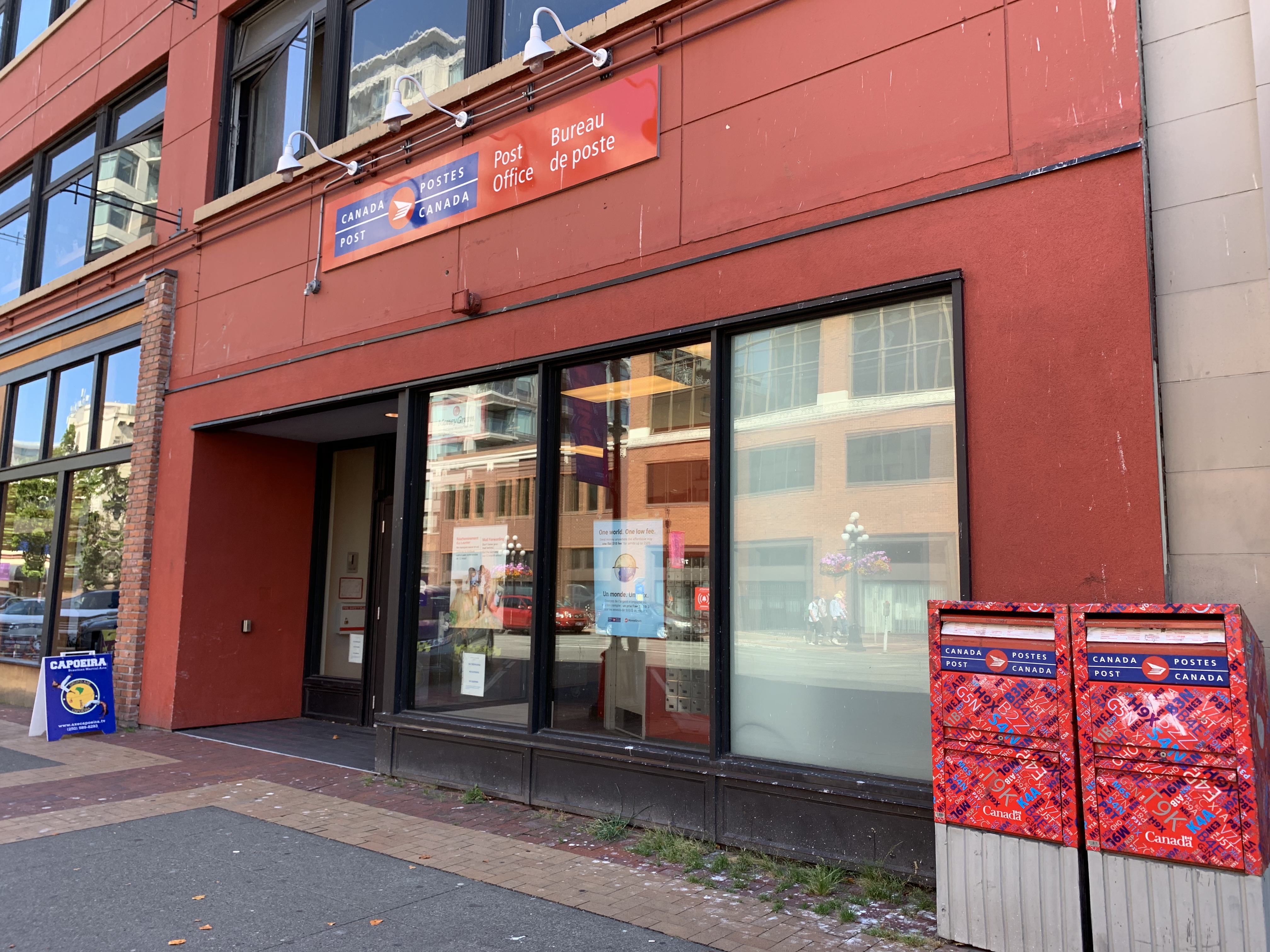 August 25, 2019 14:52 photograph